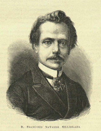 Retrato de Francisco Navarro Villoslada, recogido en la revista española La Ilustración Católica.